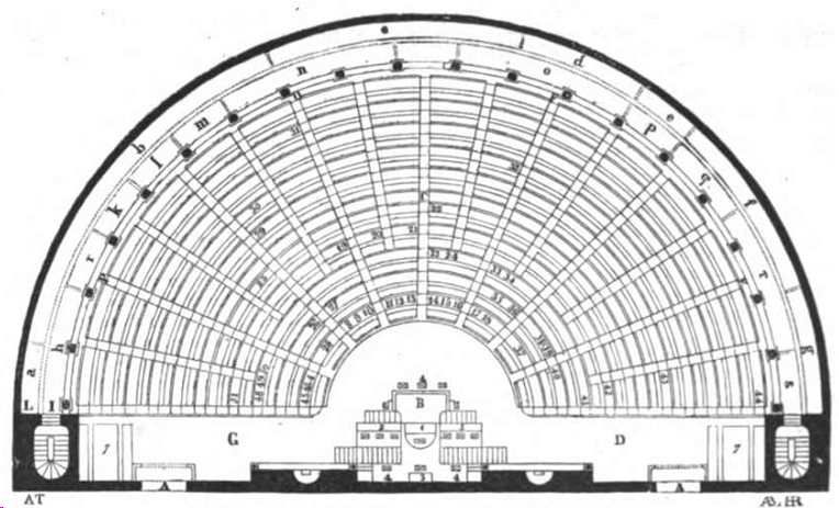 Grundriß des Sitzungssaales der Deputirtenkammer. A. Eingang der Deputirten. G. Linker Verbindungsgang. D. Rechter Verbindungsgang. B. Rednerbühne. – C. Verbindungsgang. E. Rechte. F. Rechtes Centrum. P. Linke. O. Linkes Centrum. I. Untere Logenreihe. L. Obere Logenreihe. a. Loge der Journalredacteure. b. Obere Loge. c. Loge der Journalisten. d. Loge der Municipalität von Paris und der höhern Offiziere der Nationalgarde. e. Loge der wachthabenden Nationalgarden. f. Oeffentliche Loge. g. Obere Loge. h. Untere Loge. i. Loge für ehemalige Deputirte. k. Loge des Staatsraths. l. Loge der Kammerquästoren. m. Loge des Präsidenten und der Vicepräsidenten. n. Untere Loge. o. Untere Loge. p. Loge des Hofes. q. Loge der Pairs. r. Loge des Diplomatischen Corps. s. Untere Loge. Sitze der Mitglieder und Minister. 1. Der Präsident Sauzet. 2. Die Secretäre Boissy d’Anglas, Las Cases... 3. Die Secretäre de l’Espée, Lacrosse... 4. Kammerboten. 5. Ein Secretär des Präsidenten. 6. Schnellschreiber. 7. Bureau des Moniteur. – 8. Cunin-Gridaine, Minister des Handels und Landbaus. 9. Teste, Minister der öffentlichen Arbeiten. 10. Billemain, Minister des öffentlichen Unterrichts. 11. Martin (du Nord), Minister der Justiz und des Cultus. 12. Duperré, Minister der Marine und der Colonieen. 13. Laplagne, Finanzminister. 14. Soult, Conseilpräsident und Kriegsminister. 15. Duchatel, Minister des Innern. 16. Guizot, Minister der auswärtigen Angelegenheiten. – 17. Berryer. 18. Salvandy. 19. Thiers. 20. Lefebvre. 21. Carné. 22. Jaubert. 23. Sebastiani. 24. Fulchiron. 25. Gouin. 26. Dupin. 27. Vivien. 28. Boudet. 29. G. de Beaumont. 30. Tocqueville. 31. Delessert. 32. Vitet. 33. Duvergier de Hauranne. 34. Rémusat. 35. Billaut. 36. Jacqueminot. 37. Mauguin. 38. Passy. 39. Dufaure. 40. Ganneron. 41. Lamartine. 42. Larochejaquelin. 43. Labourdonnaye. 44. Emile de Girardin. 45. Laffitte. 46. Arago. 47. Odilon-Barrot. 48. Ledru Rollin. 49. Cormenin. 50. Dupont. 51. Tracy.